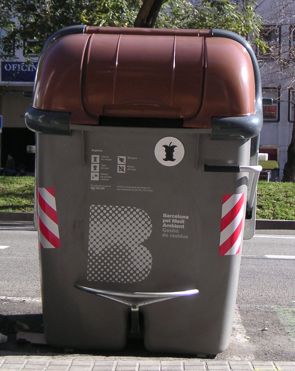 Contenidor per a residus sòlids urbans orgànics a Barcelona.